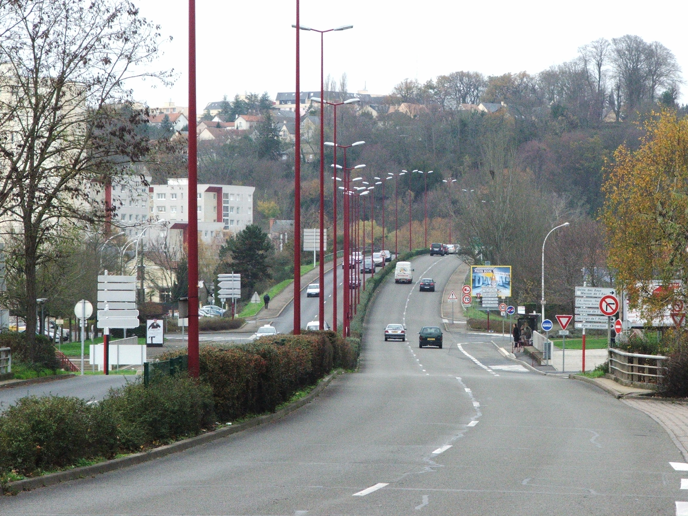 La rocade sud au niveau des Sablons.